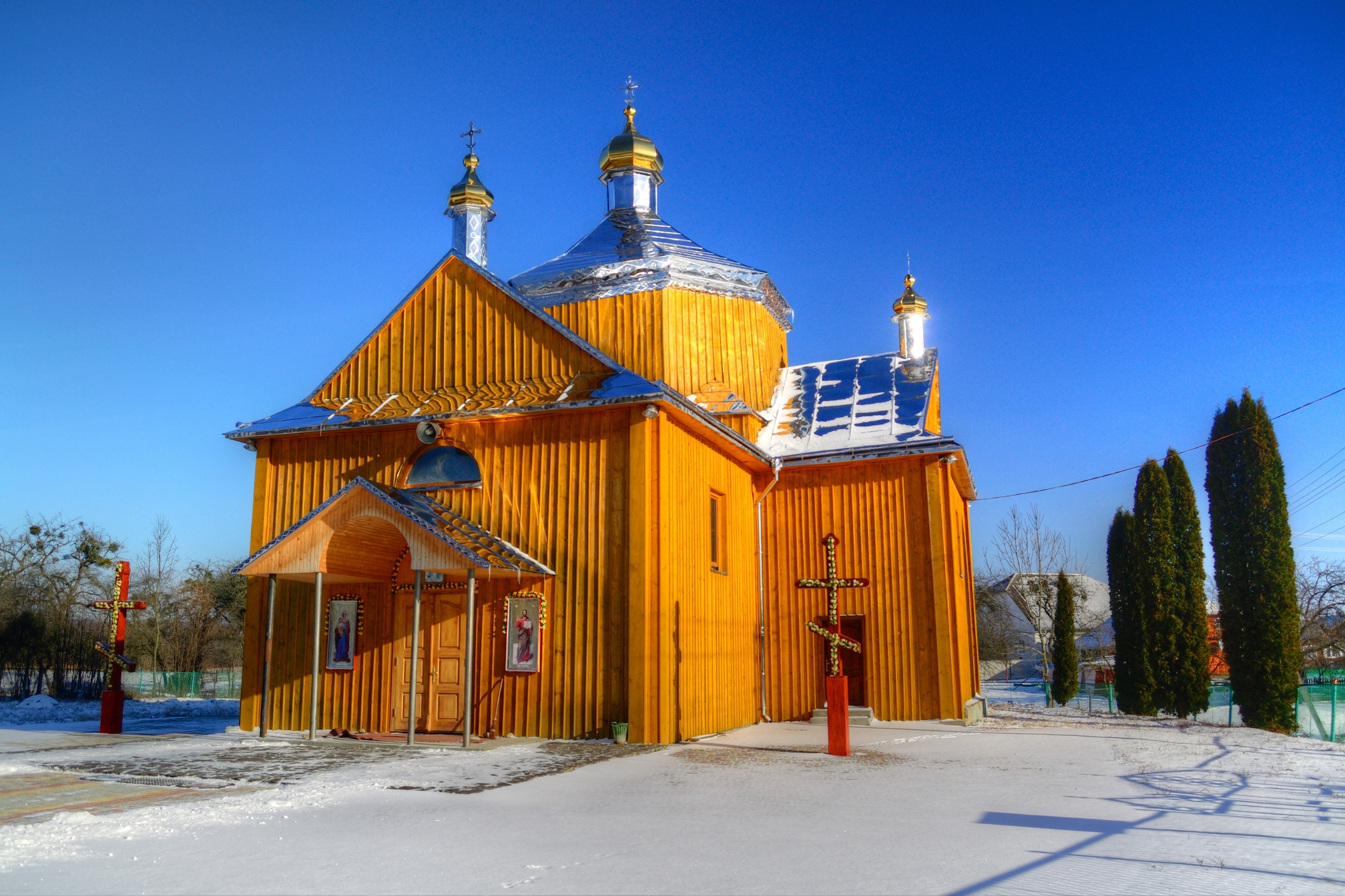 Деревянна церква св. Миколая 1834